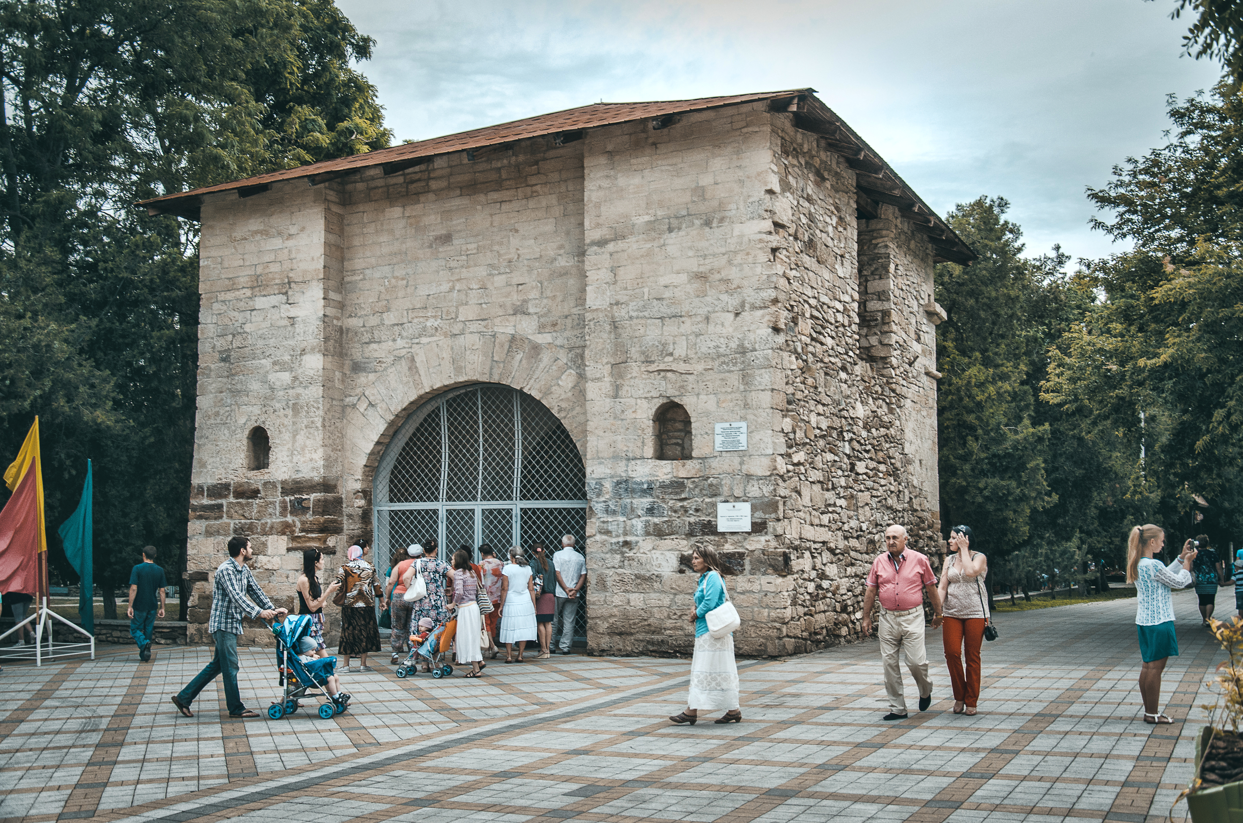 Русские ворота и остатки стен крепости: улица Пушкина (вход в парк 30-летия Победы), Анапа, город-курорт Анапа, Краснодарский край